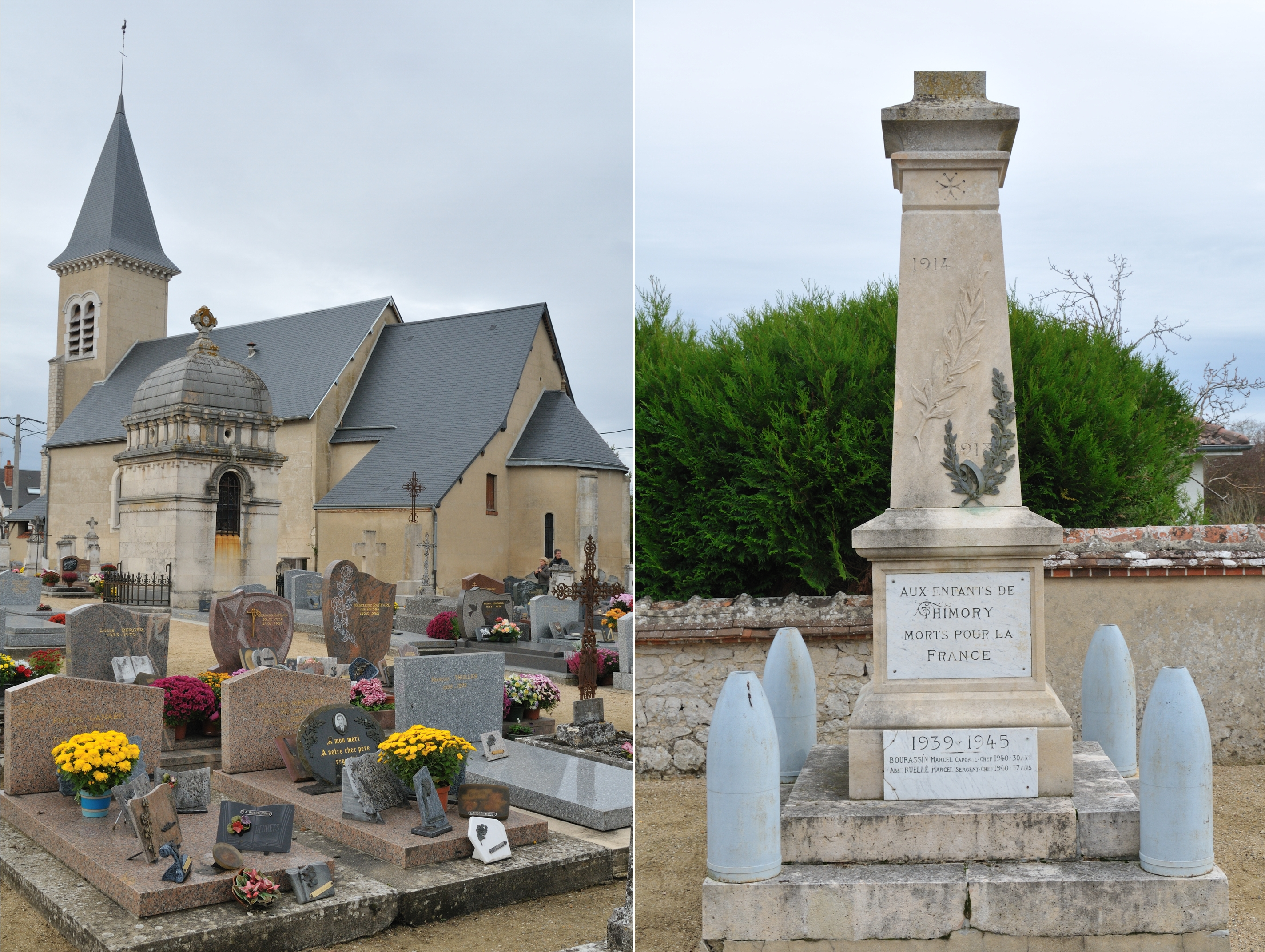 Assemblage de deux photos (cimetière et église Saint-Germain et monument aux morts) de Thimory, Loiret, France